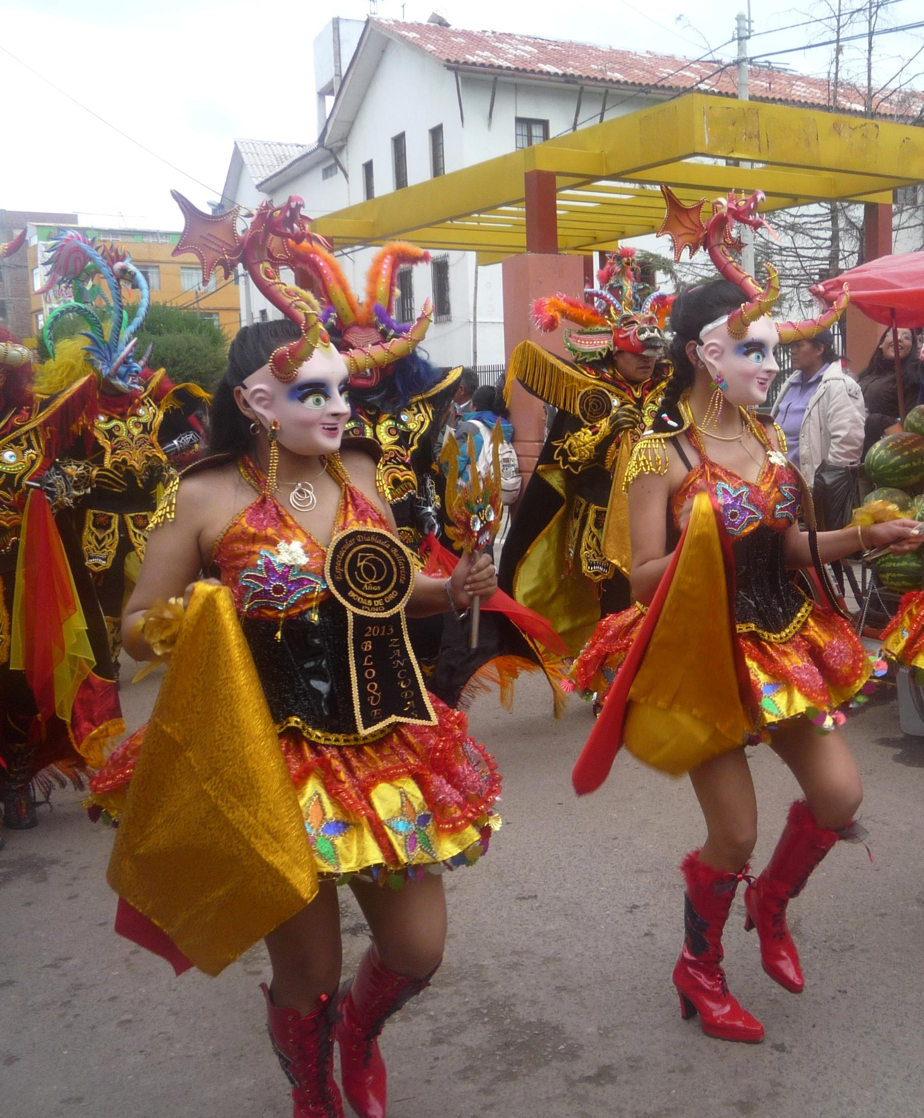 Fiesta de la Candelaria 2013